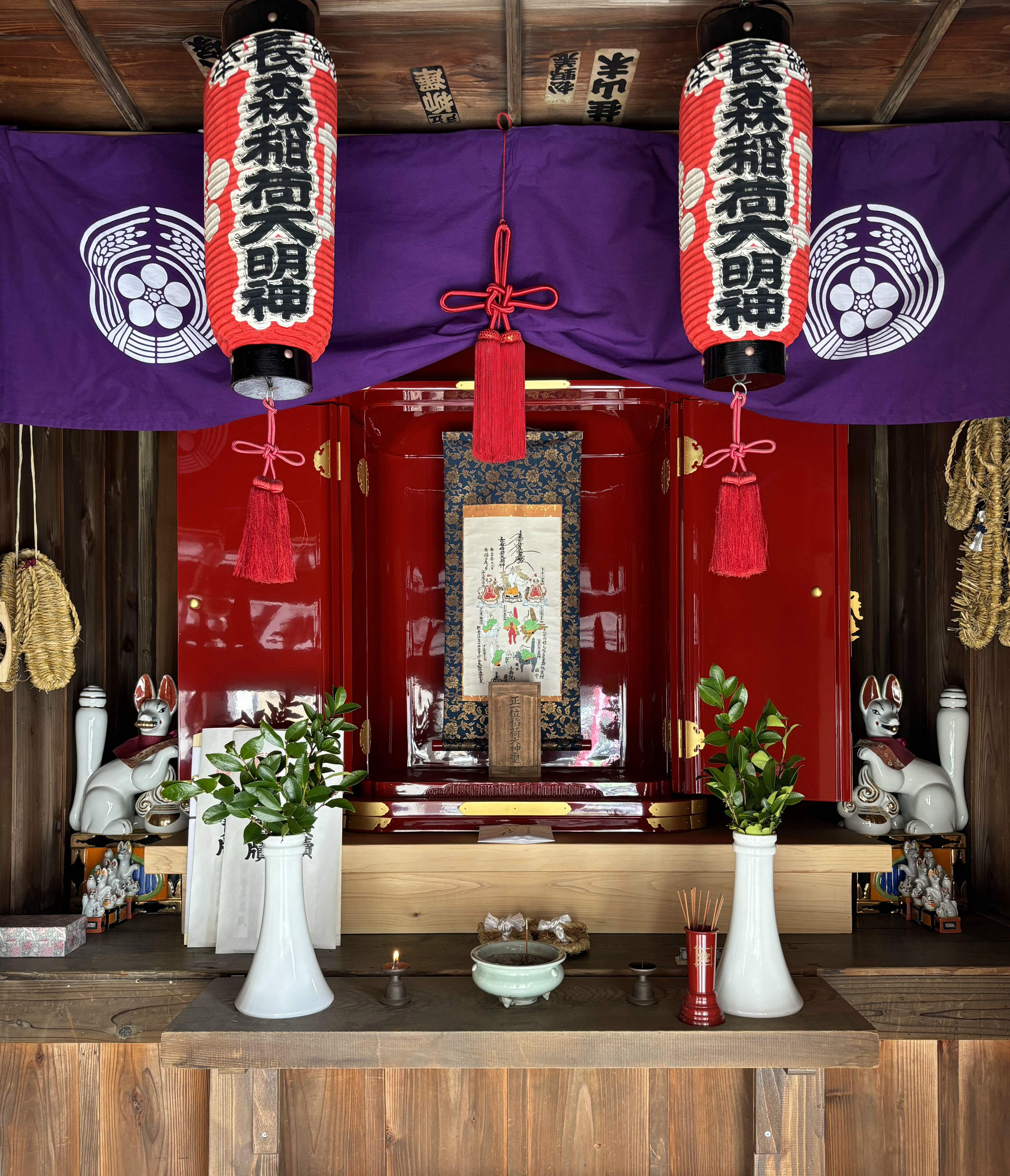 長森稲荷社社殿内部